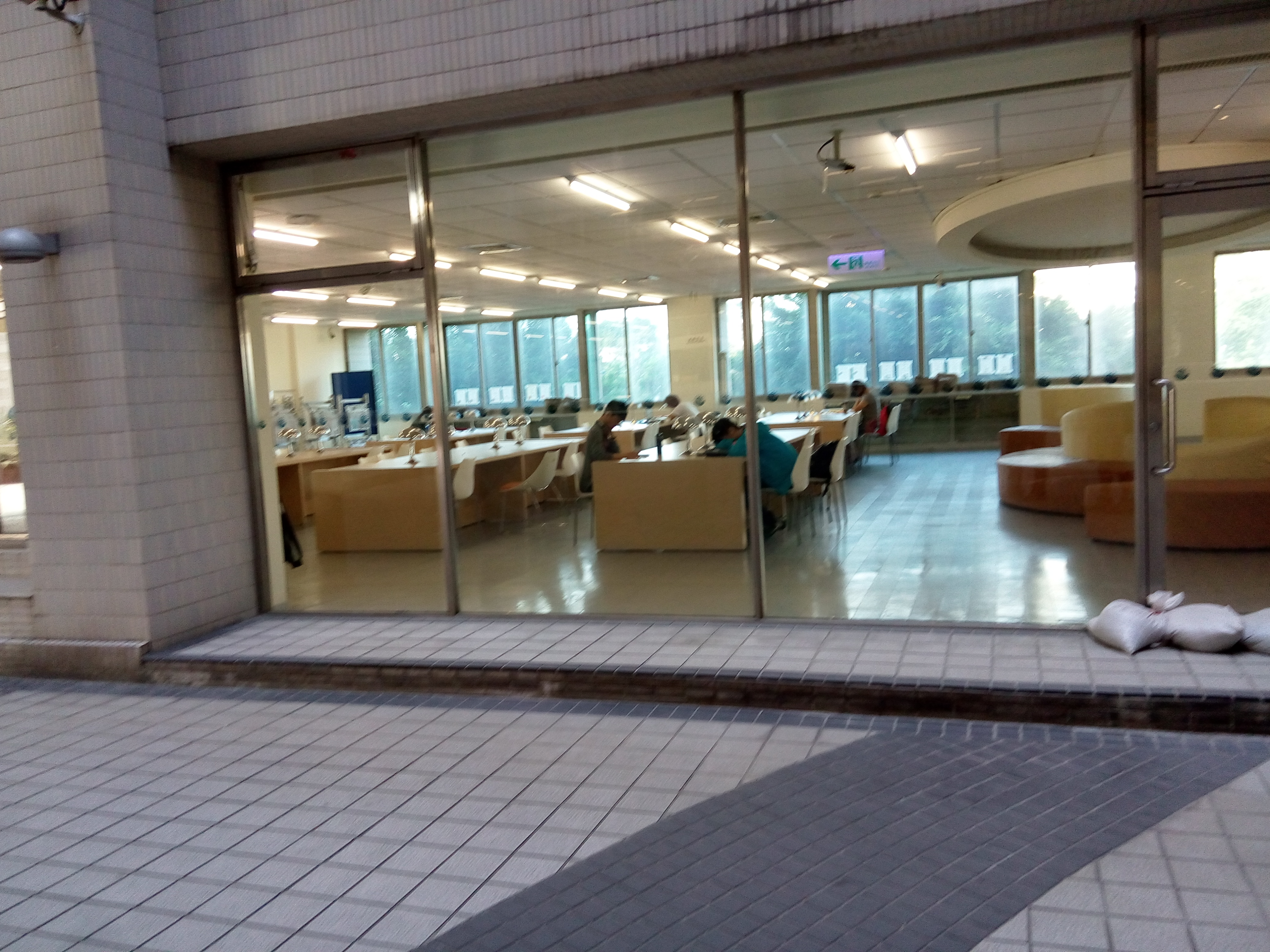 亞東技院圖書館的一部分，提供校外人士自修，不開放電源。